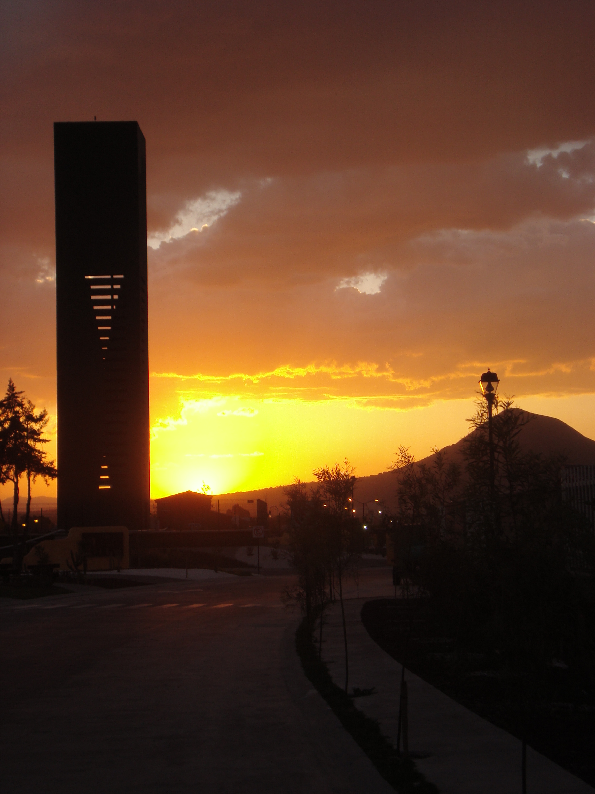 Atardecer desde el fraccionamiento Misiones, en Huehuetoca, México. Al fondo se observa el cerro de Cincoque.